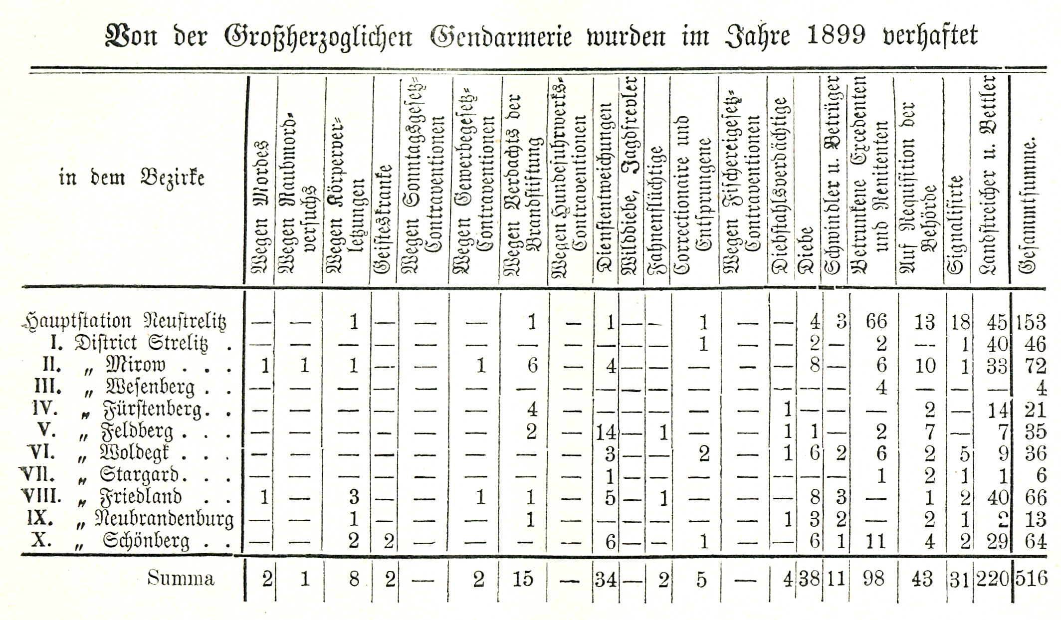 statistische Erhebungen der im Jahr 1899 durchgeführten Verhaftungen in Mecklenburg-Strelitz